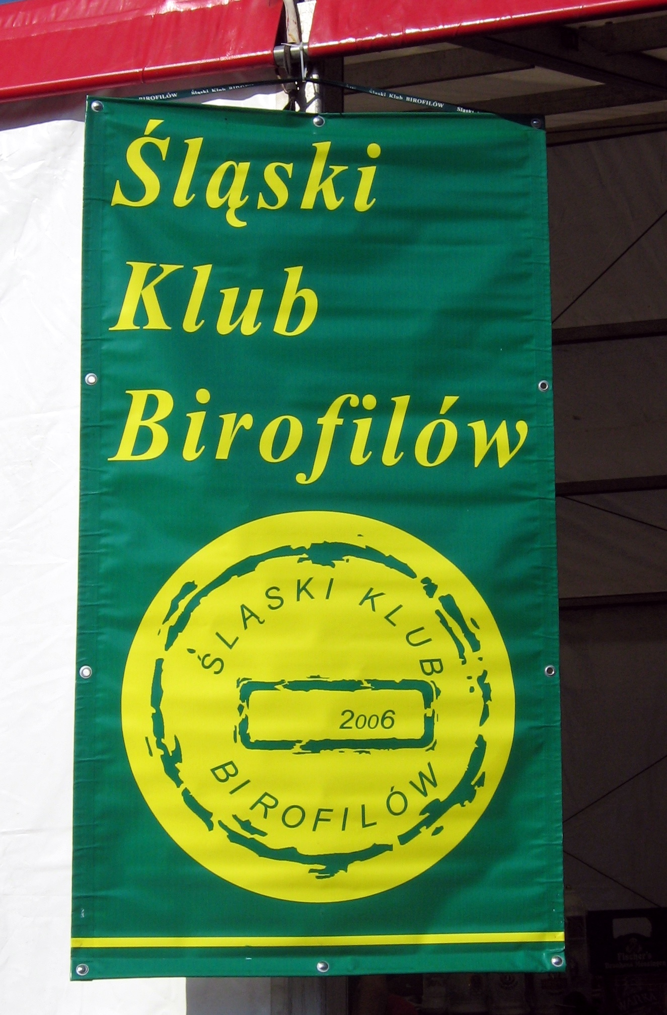 Baner na giełdzie w Cieszynie, 2011